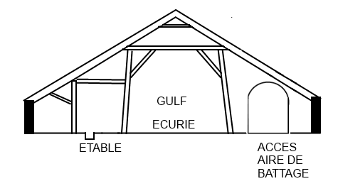 Coupe transversale maison avec Gulf, ossature à bois longs dans les fermes traditionnelles frisonnes